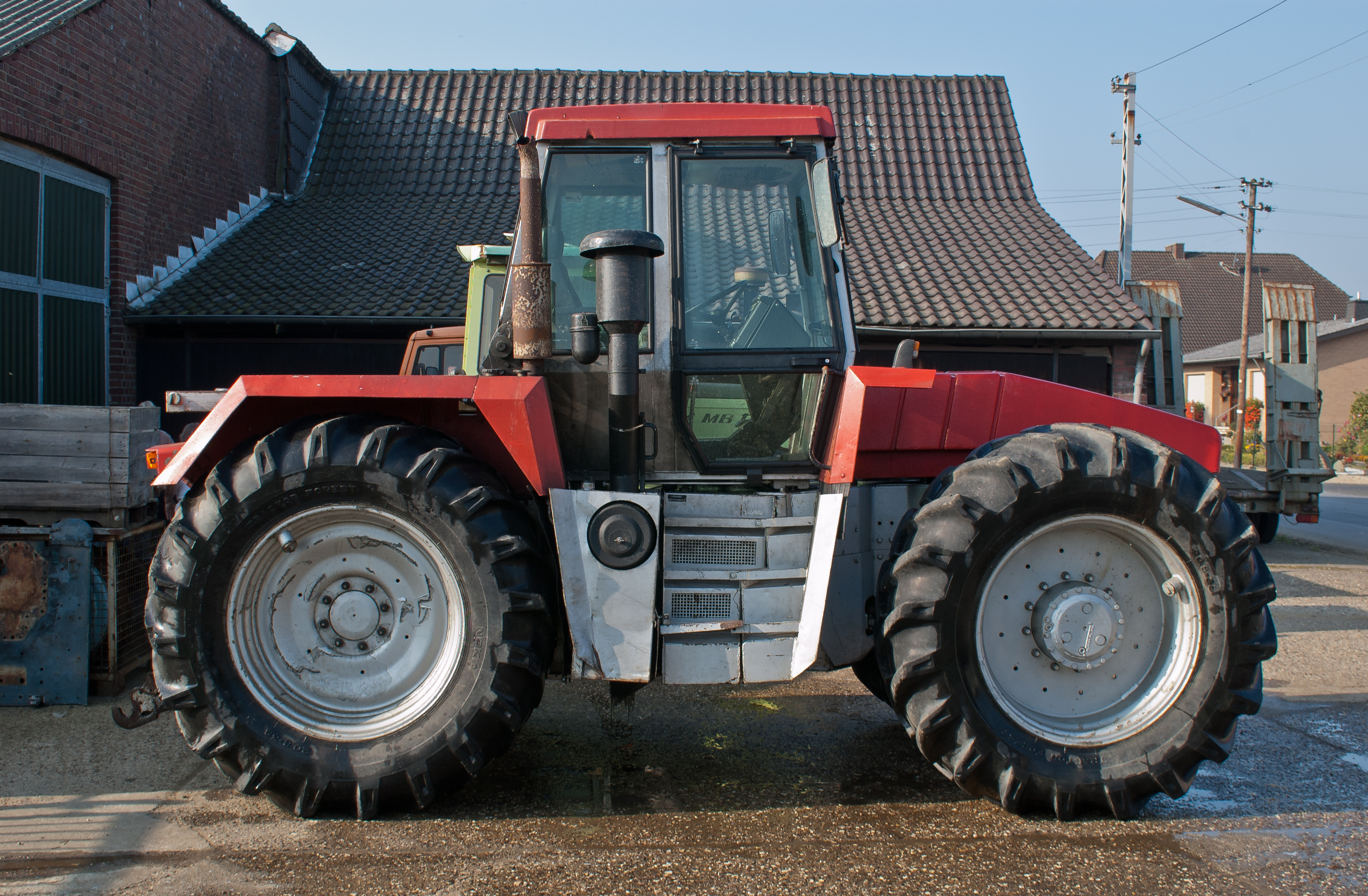 Ein Schlüter Eurotrac